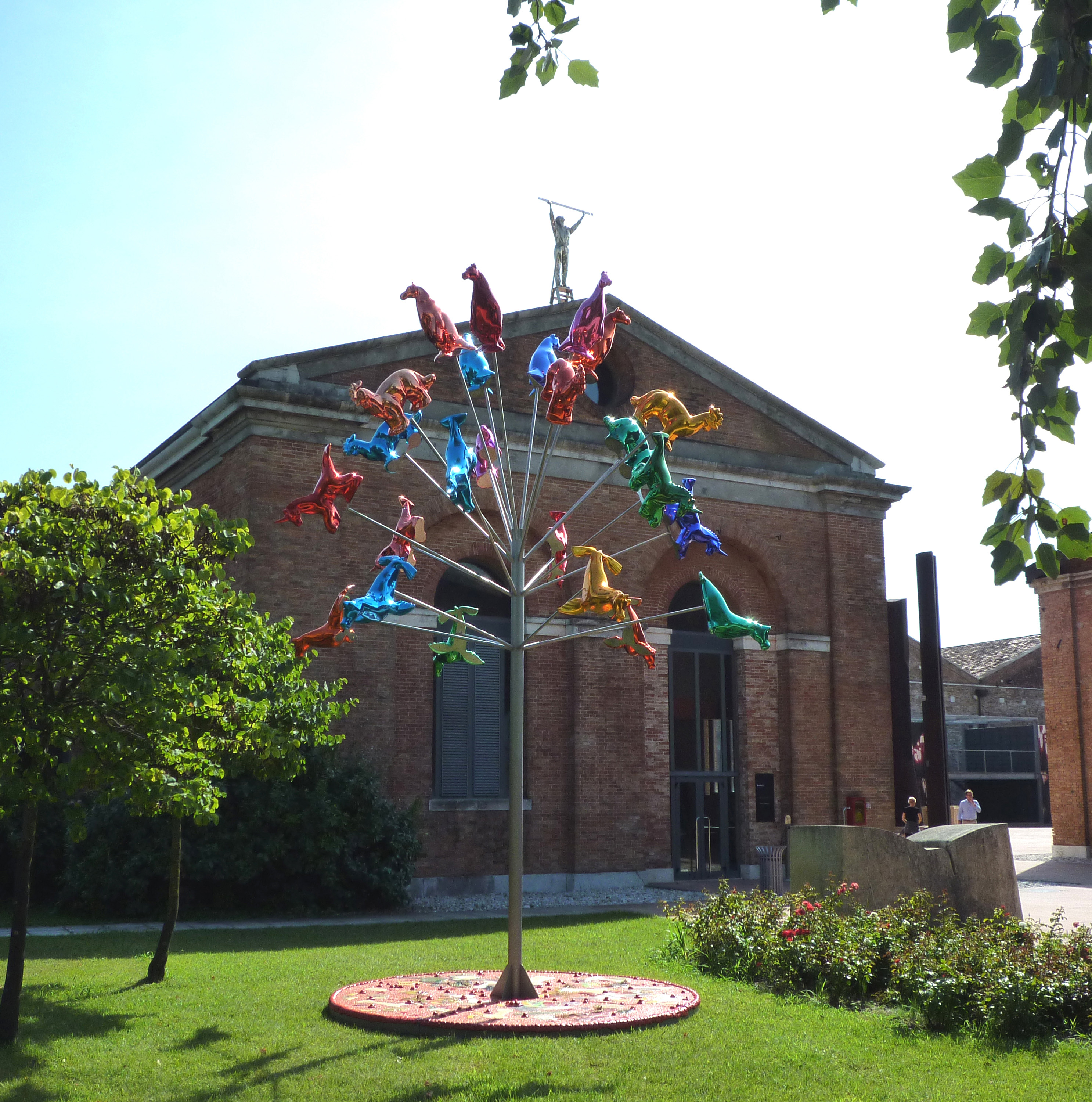 Albero delle Chimere, 2011